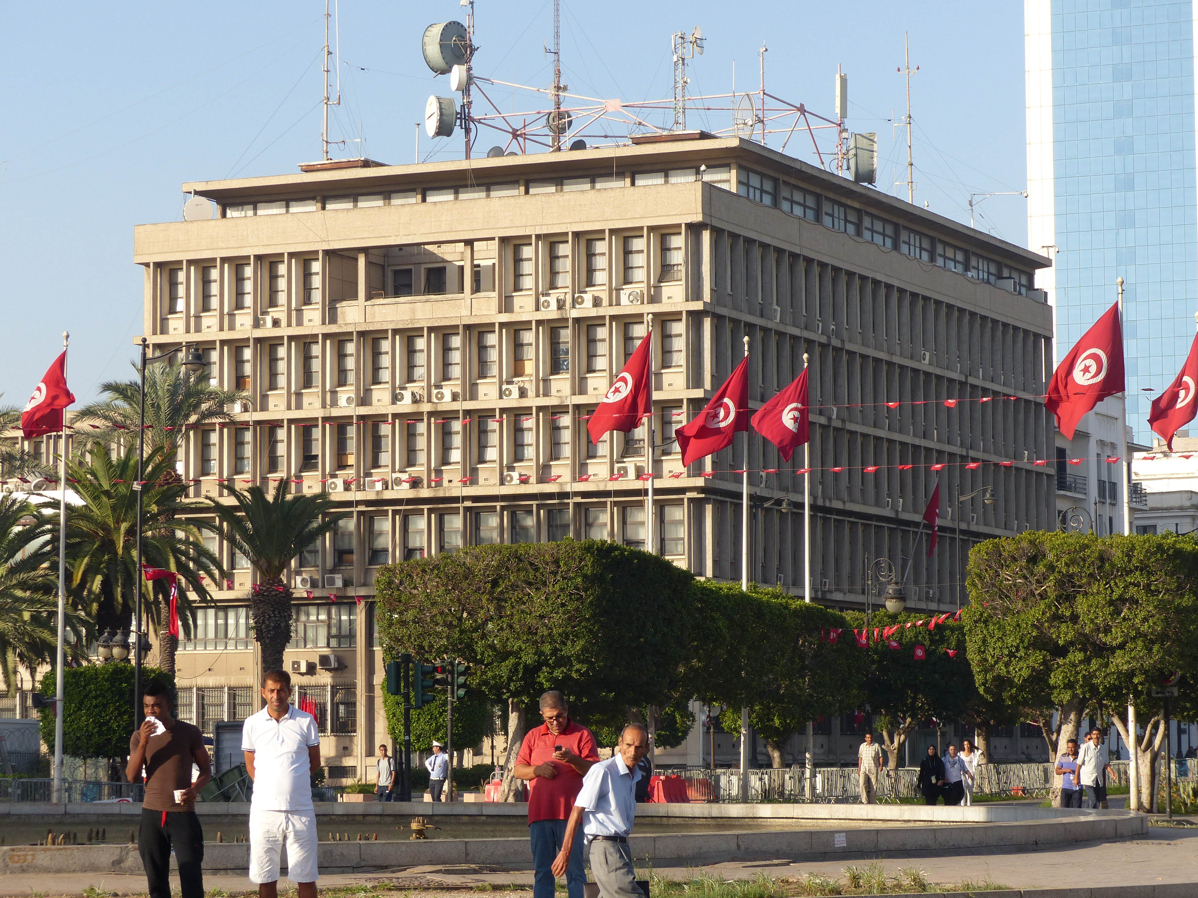 siège du Ministère de l'intérieur tunisien qui donne sur l'avenue Habib Bourguiba